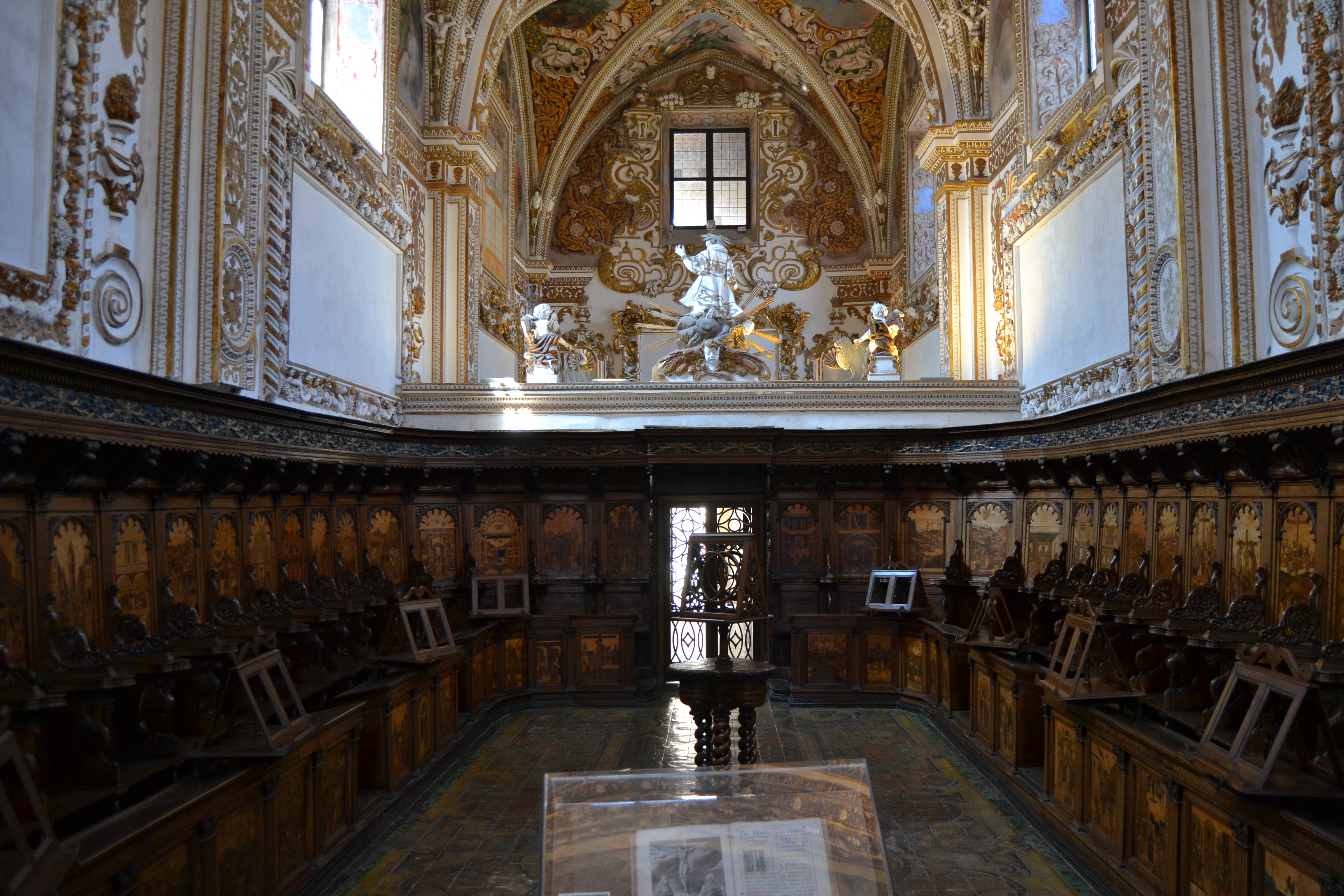 Certosa di San Lorenzo (o di Padula) - Chiesa, coro dei Padri